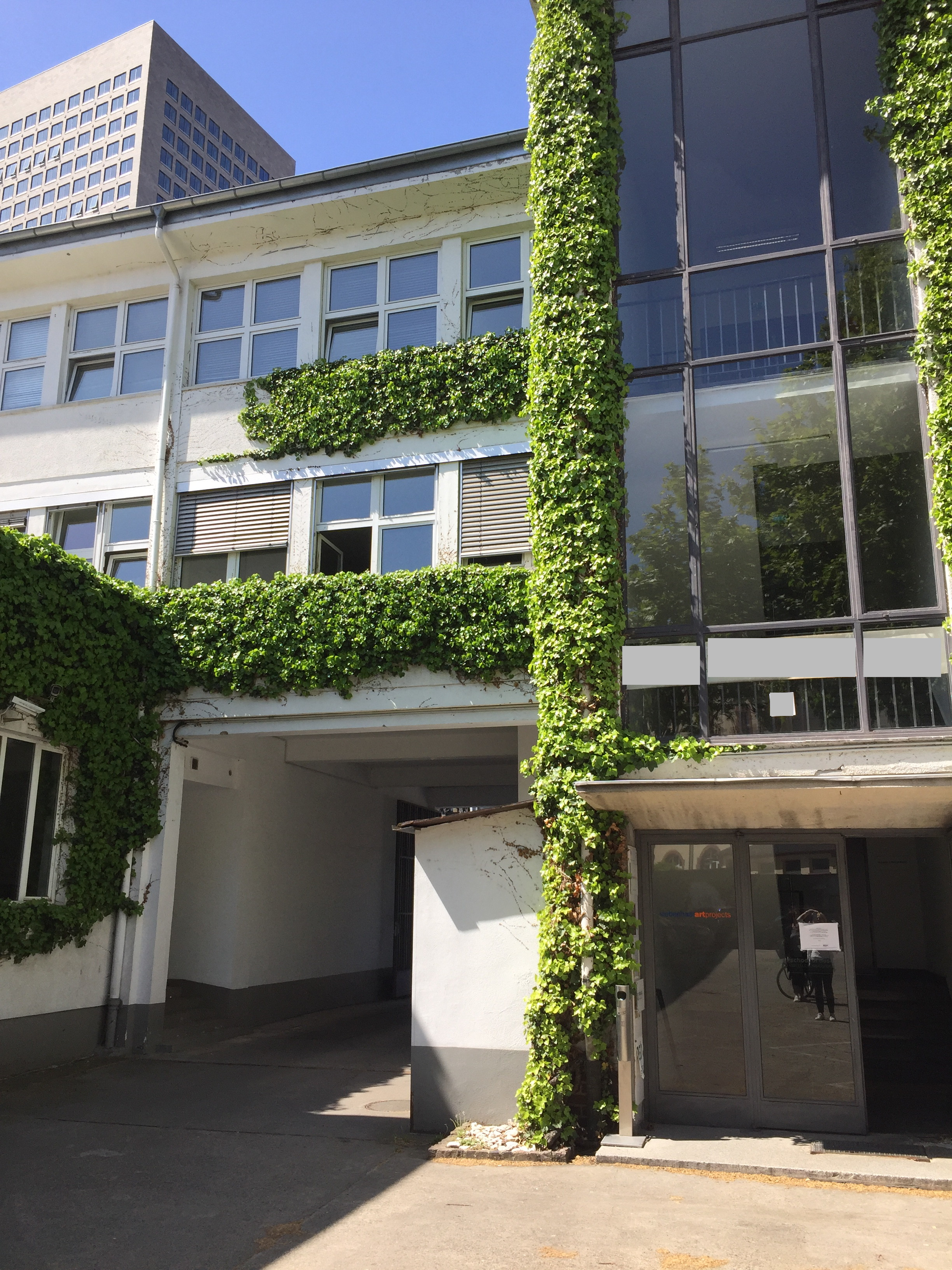 Hamburger Allee 45, Räume des Feministischen Frauengesundheitszentrums in der 2. Etage.